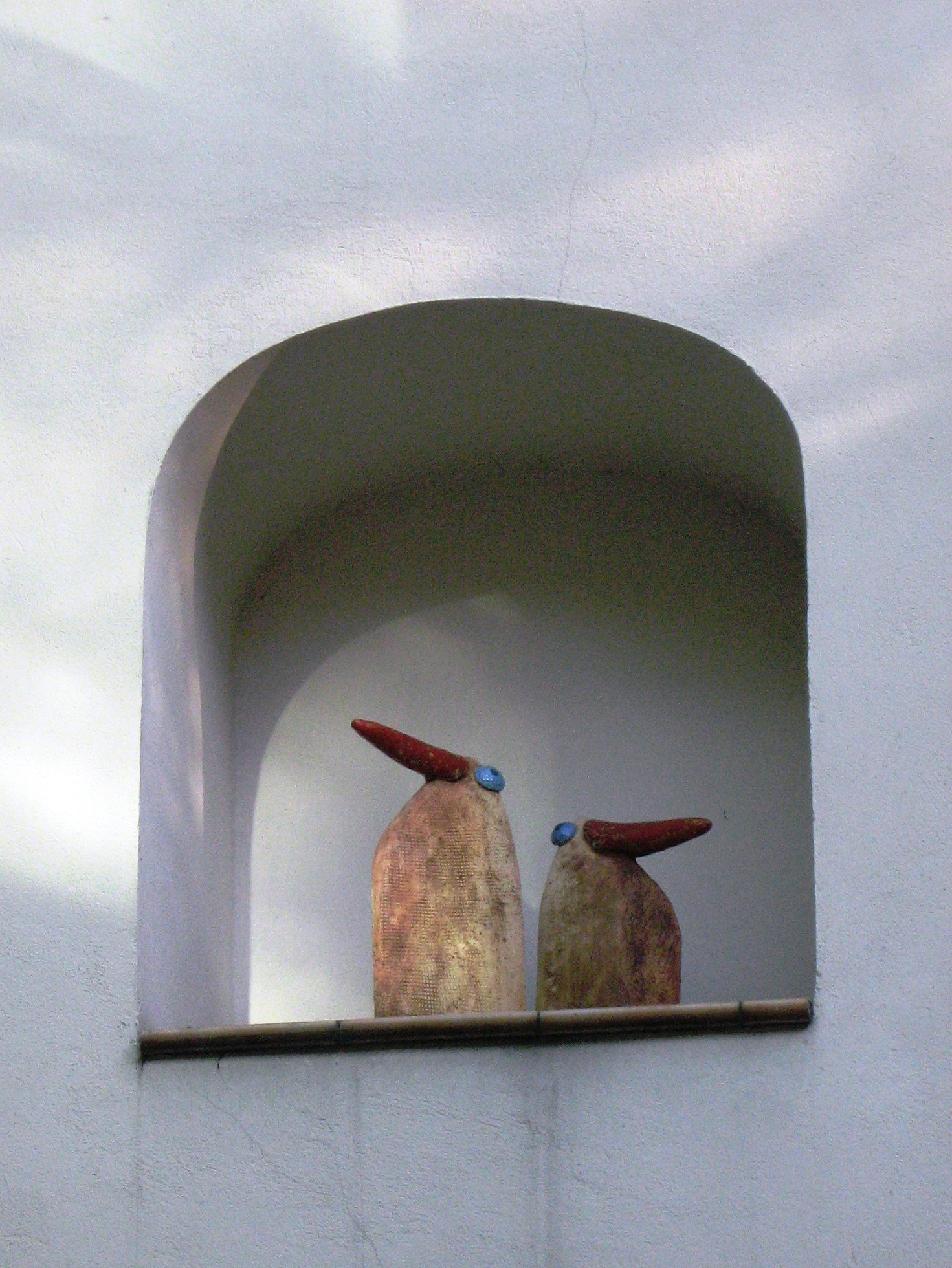 Toruń, ul. Mostowa 1 - spichrz „Szwedzki”, obecnie hotel, 1719 (zabytek nr rejestr, A/129)